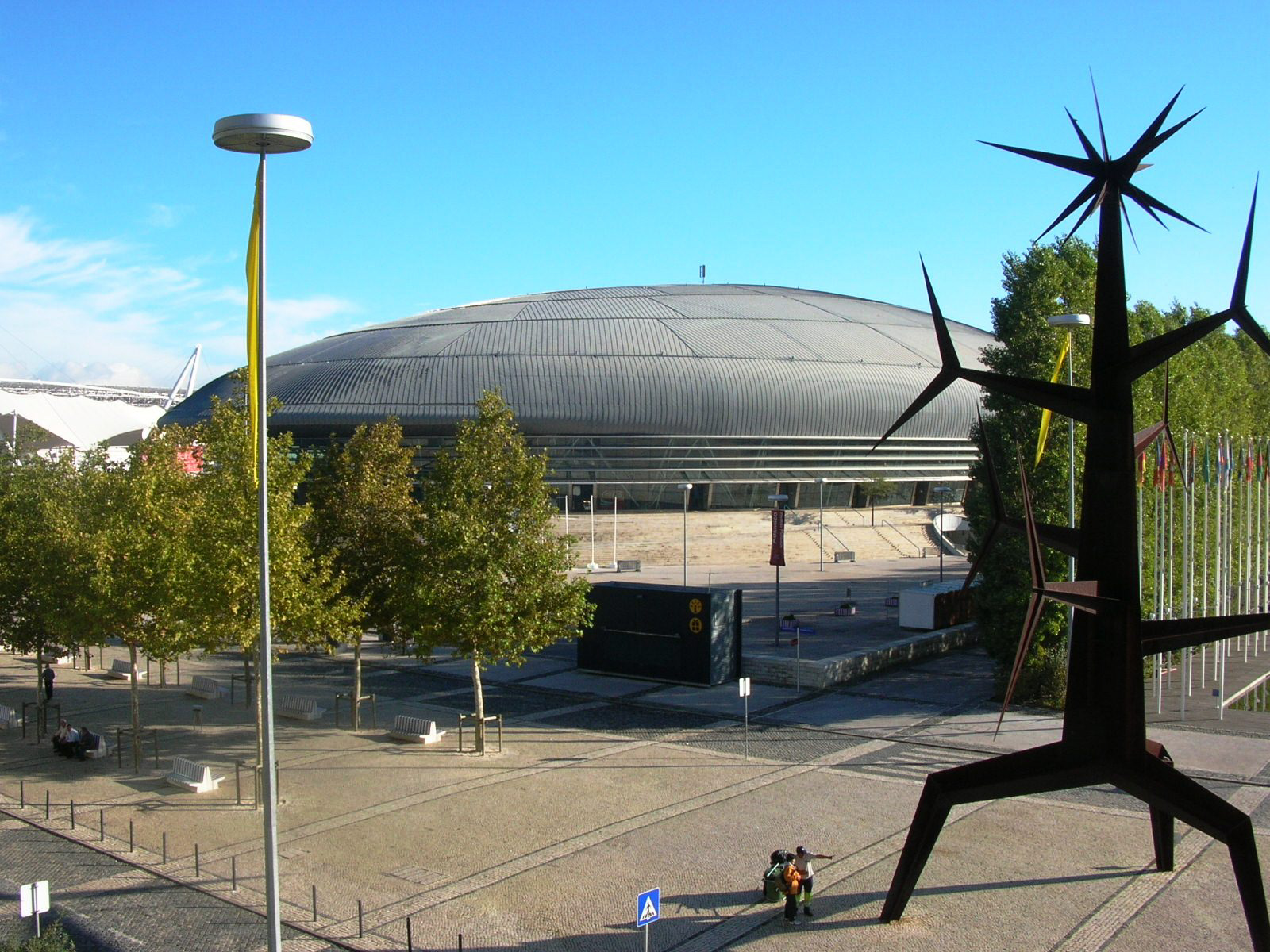 12643-Lisbon